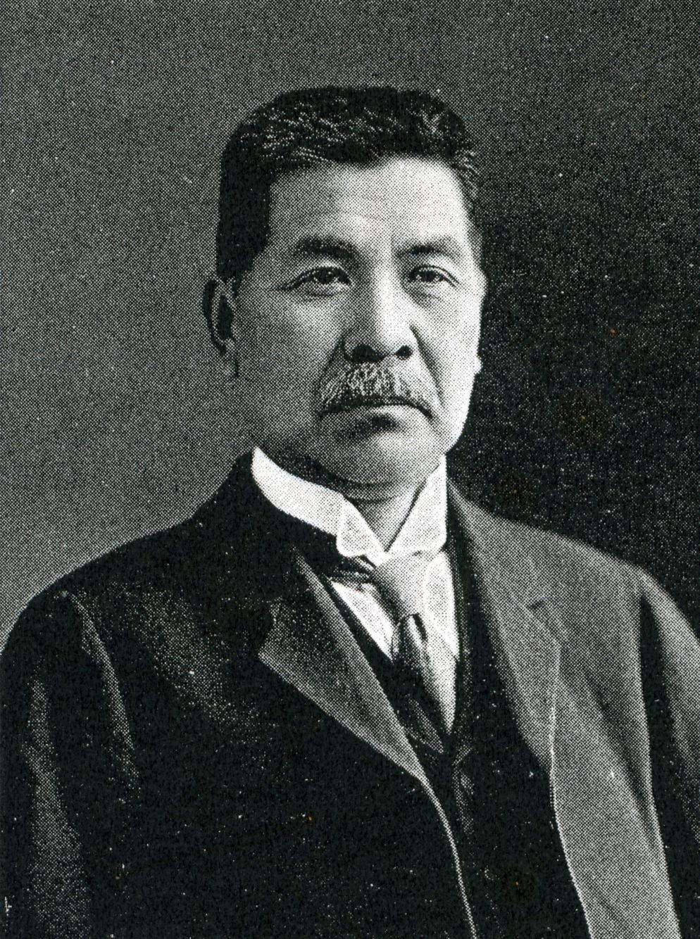 この写真は、藤沢幾之輔（1859-1940）の写真です。